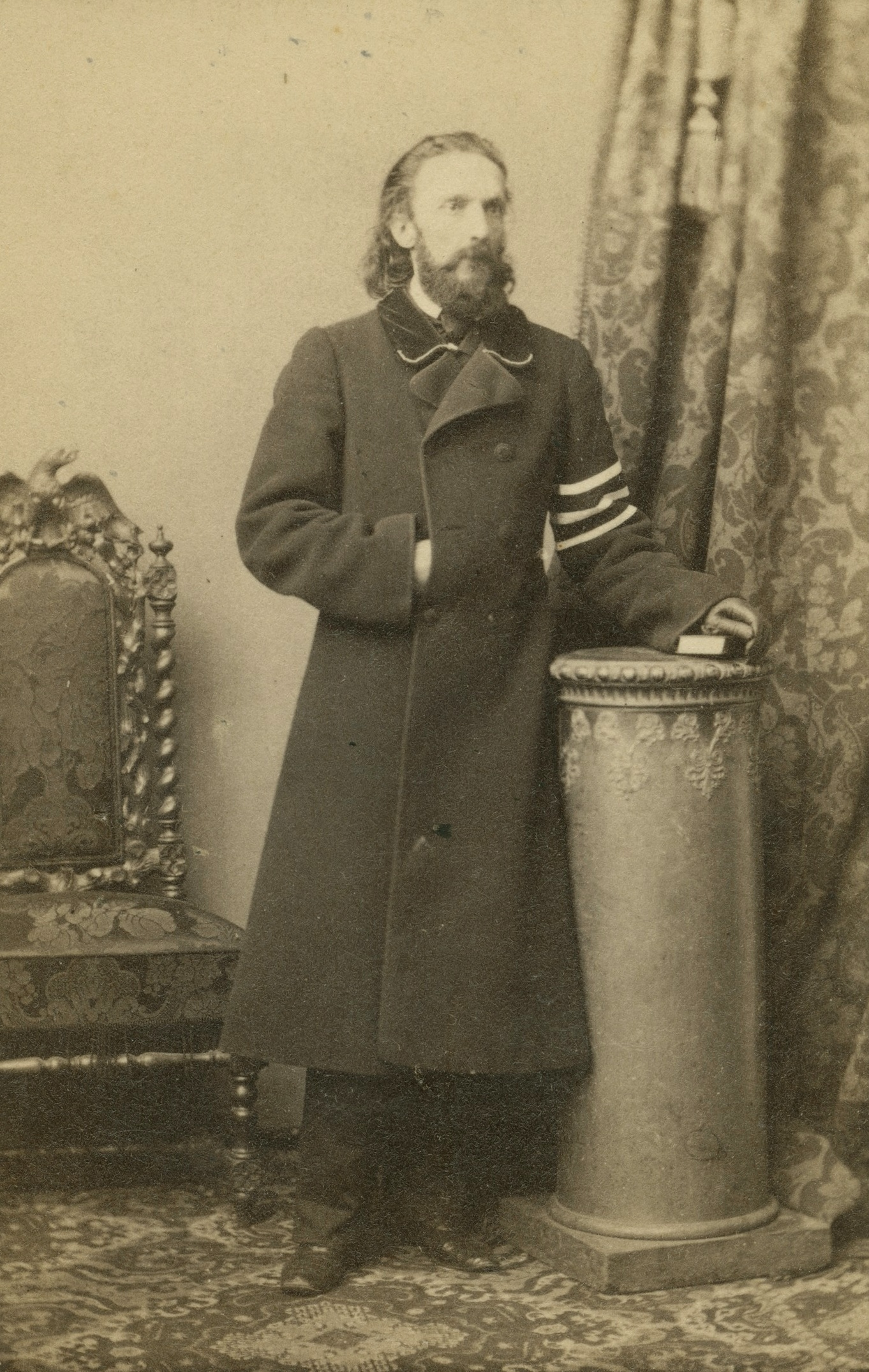 Karol Ruprecht (ur. w 1821, zm. w 1875) – polski działacz patriotyczny i społeczny, jeden z przywódców "białych"